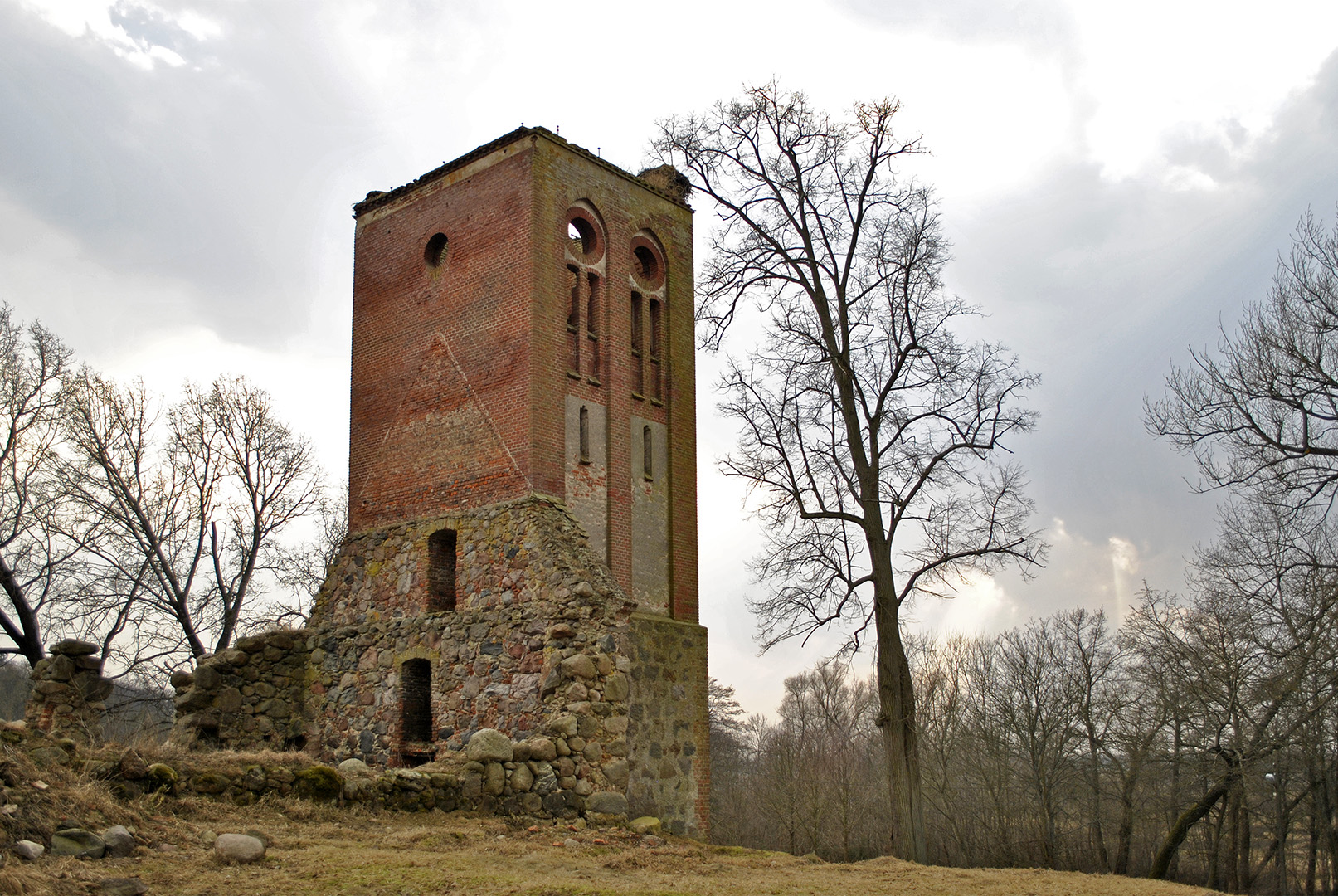 Błądkowo - ruiny kościoła